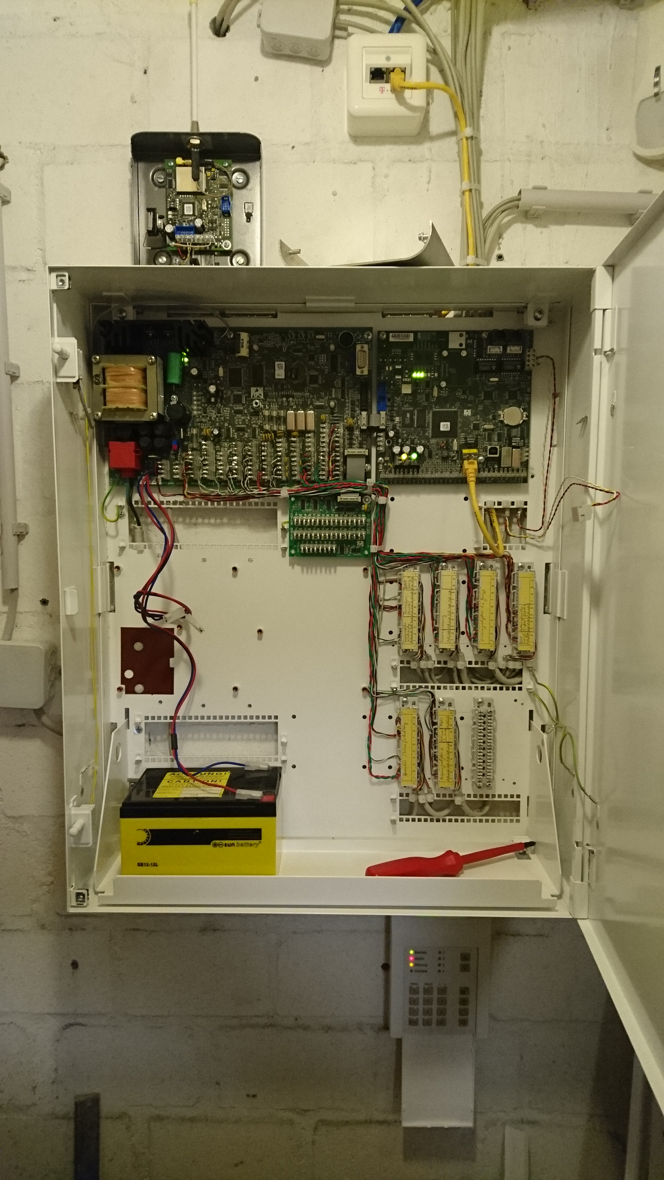 Foto einer geöffneten Einbruchmeldeanlage, an welcher Melder in Gleichstrom-, Bus- und Funktechnik betrieben werden können.